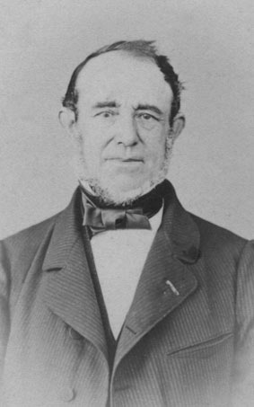 Louis Beerenbroek